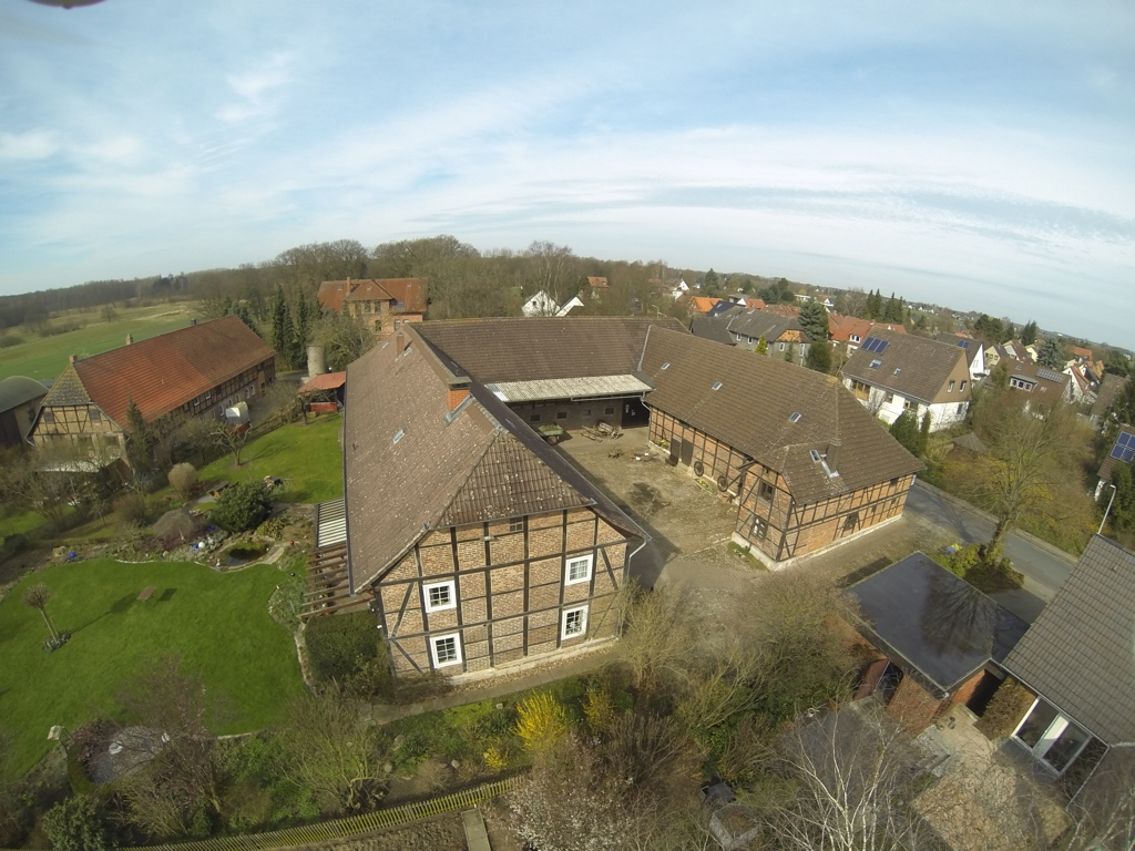 Bauernhofmuseum für jung und alt mit vielen Aktivitäten. Besichtigung nach Vereinbarung